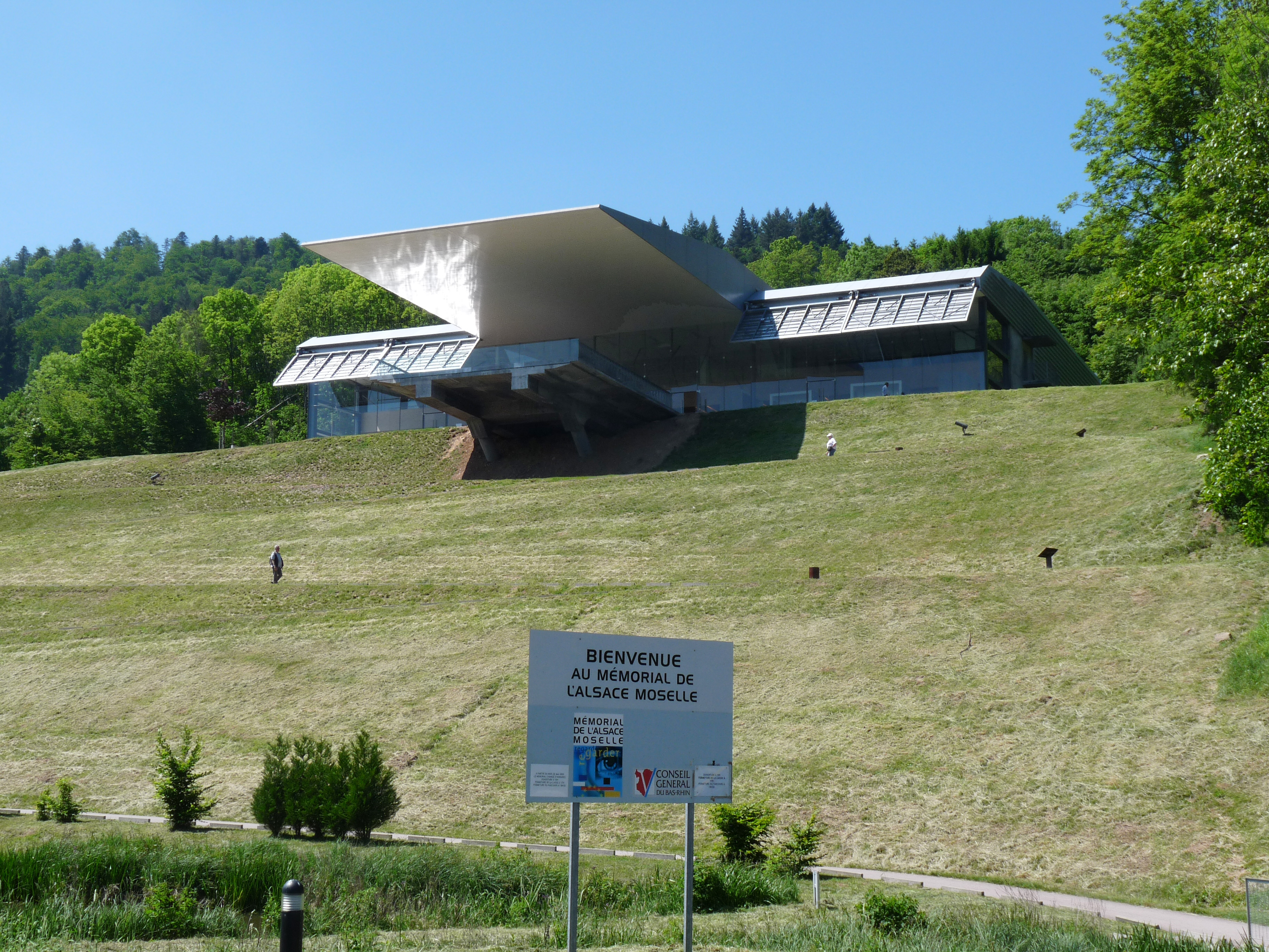 Mémorial de l'Alsace-Moselle (Bas-Rhin)